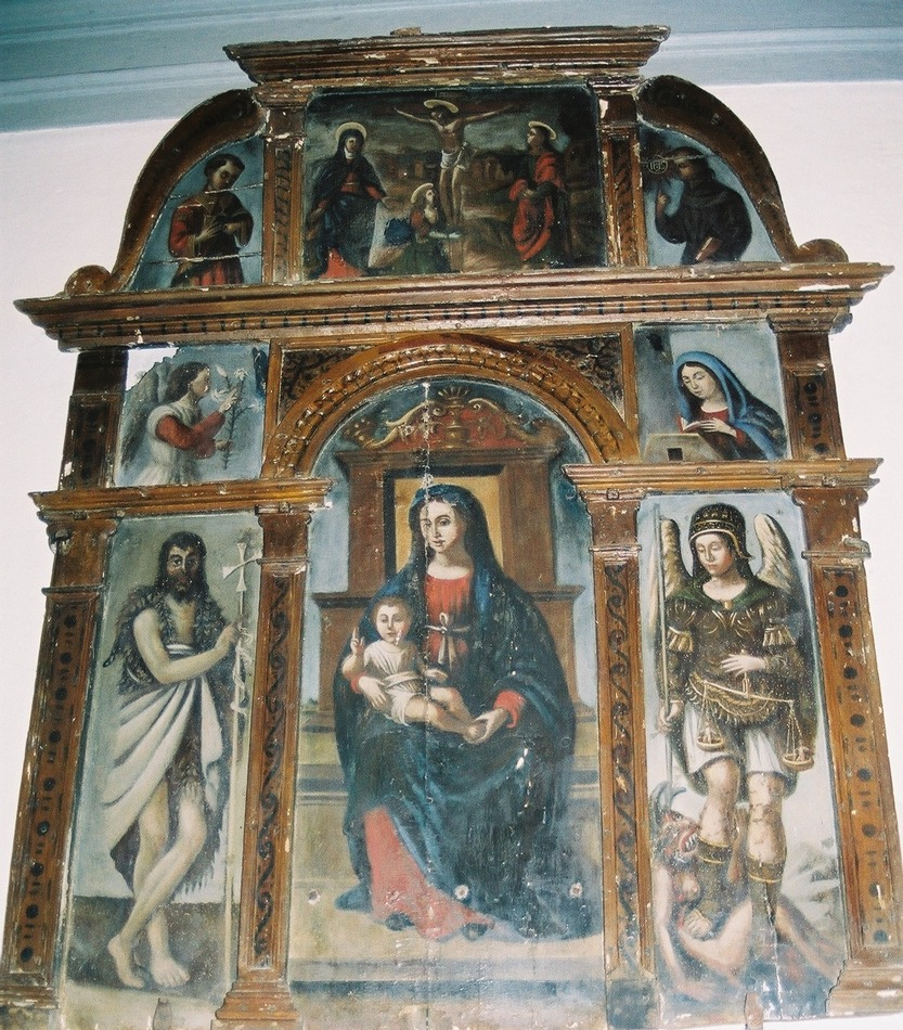 Vierge à l'Enfant, peinture sur bois, dans l'église de Tox (Haute-Corse)